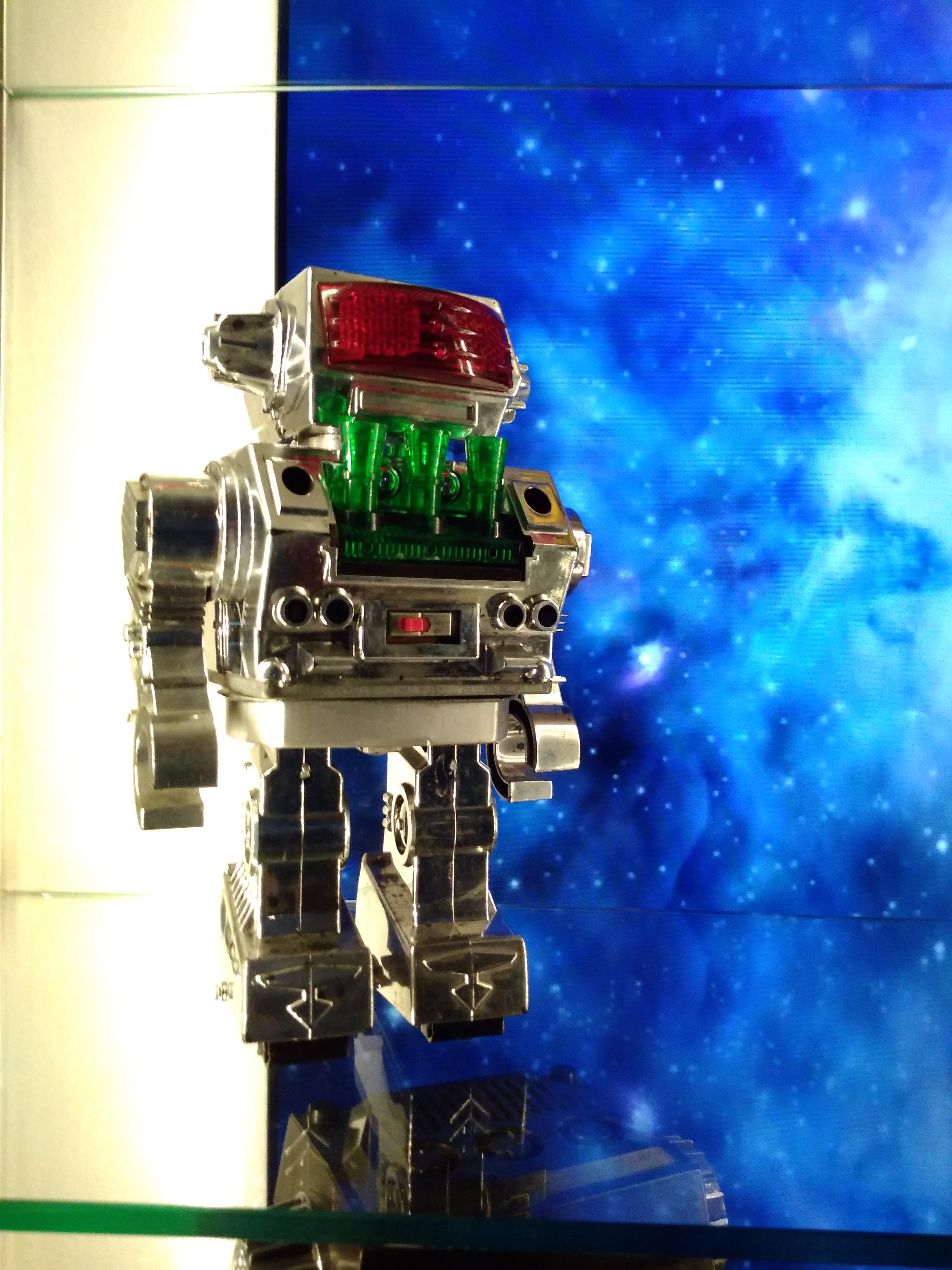 机器人在香港历史博物馆